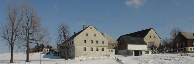 Erbgericht (links) und Kultursaal (rechts)